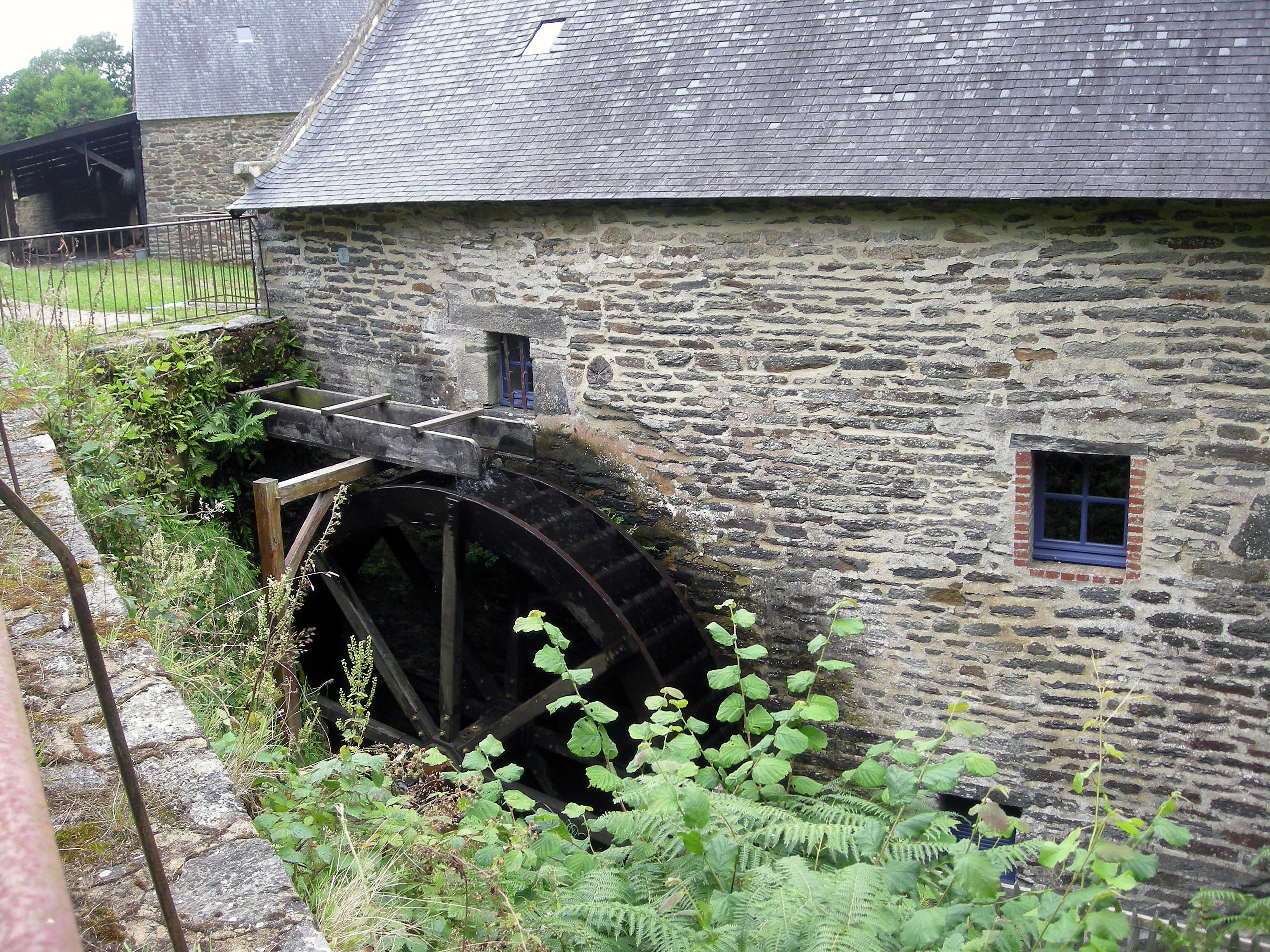 Le bâtiment principal et la roue